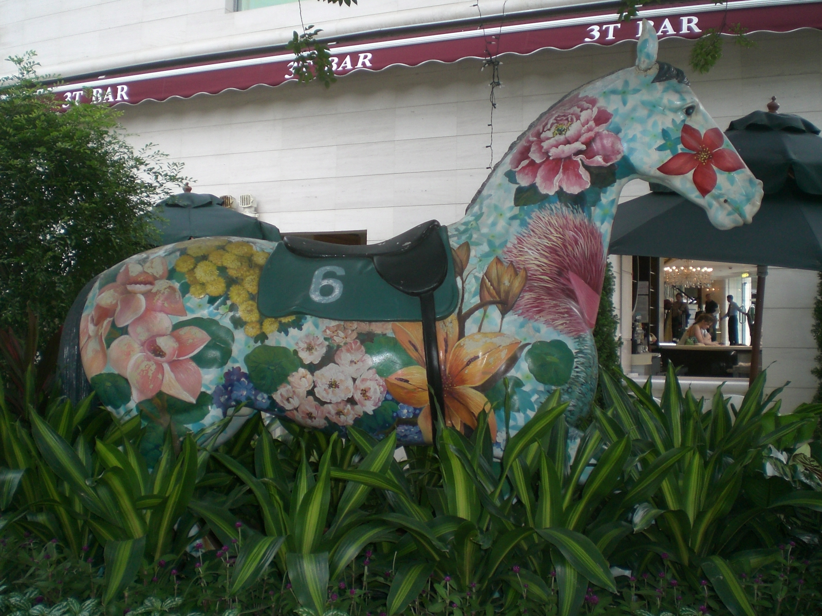 中文（香港）: 灣仔麗都酒店